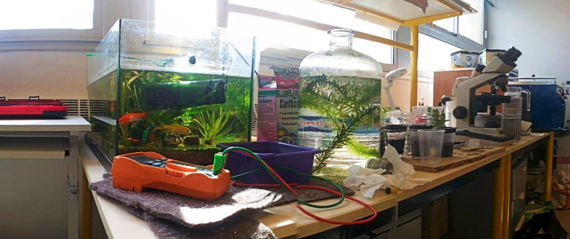 intérieur du BioLab d'Openfactory à UBO Brest